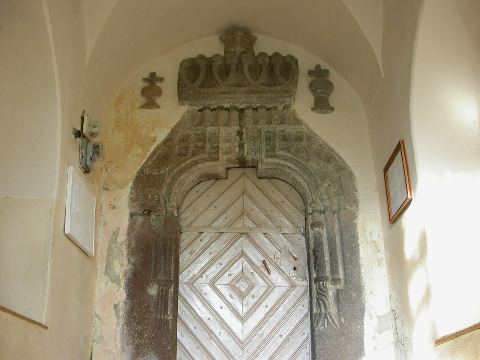 Biserica romano-catolică, sec. XVII - XVIII